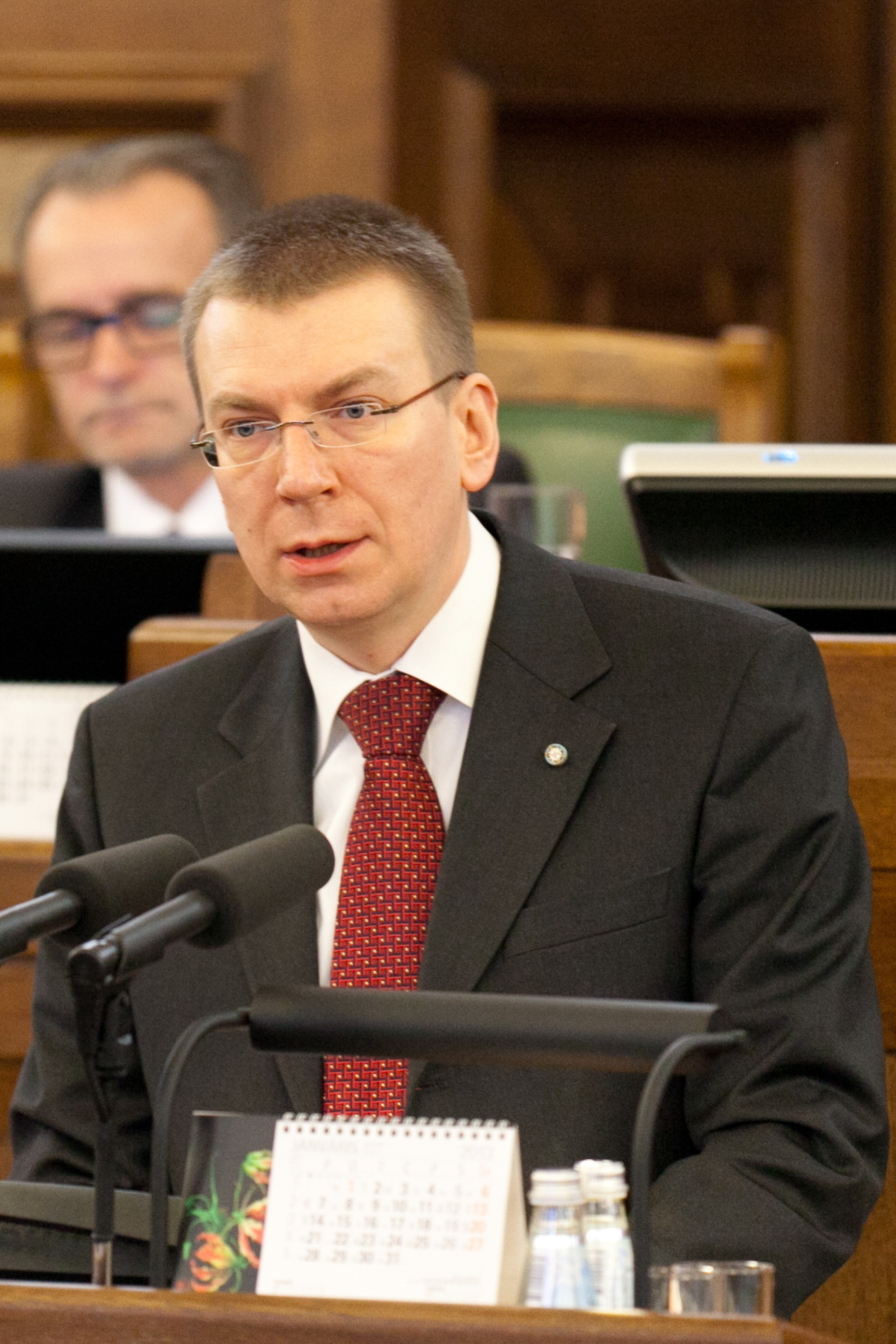 Edgars Rinkēvičs